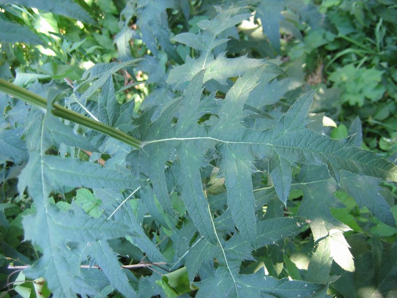 Blatt der Ritro-Kugeldistel Echinops ritro, Rostock